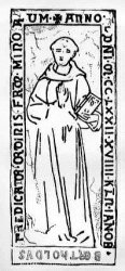 Berthold von Regensburg, einer der bekanntesten Prediger des Mittelalters